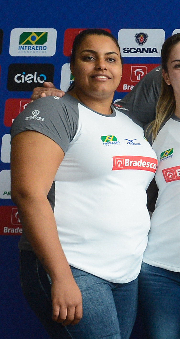 Rio de Janeiro - O presidente da Confederação Brasileira de Judô (CBJ), Paulo Wanderley, posa para fotos com os 14 judocas convocados para disputar os Jogos Olímpicos Rio 2016 (Tânia Rêgo/Agência Brasil)